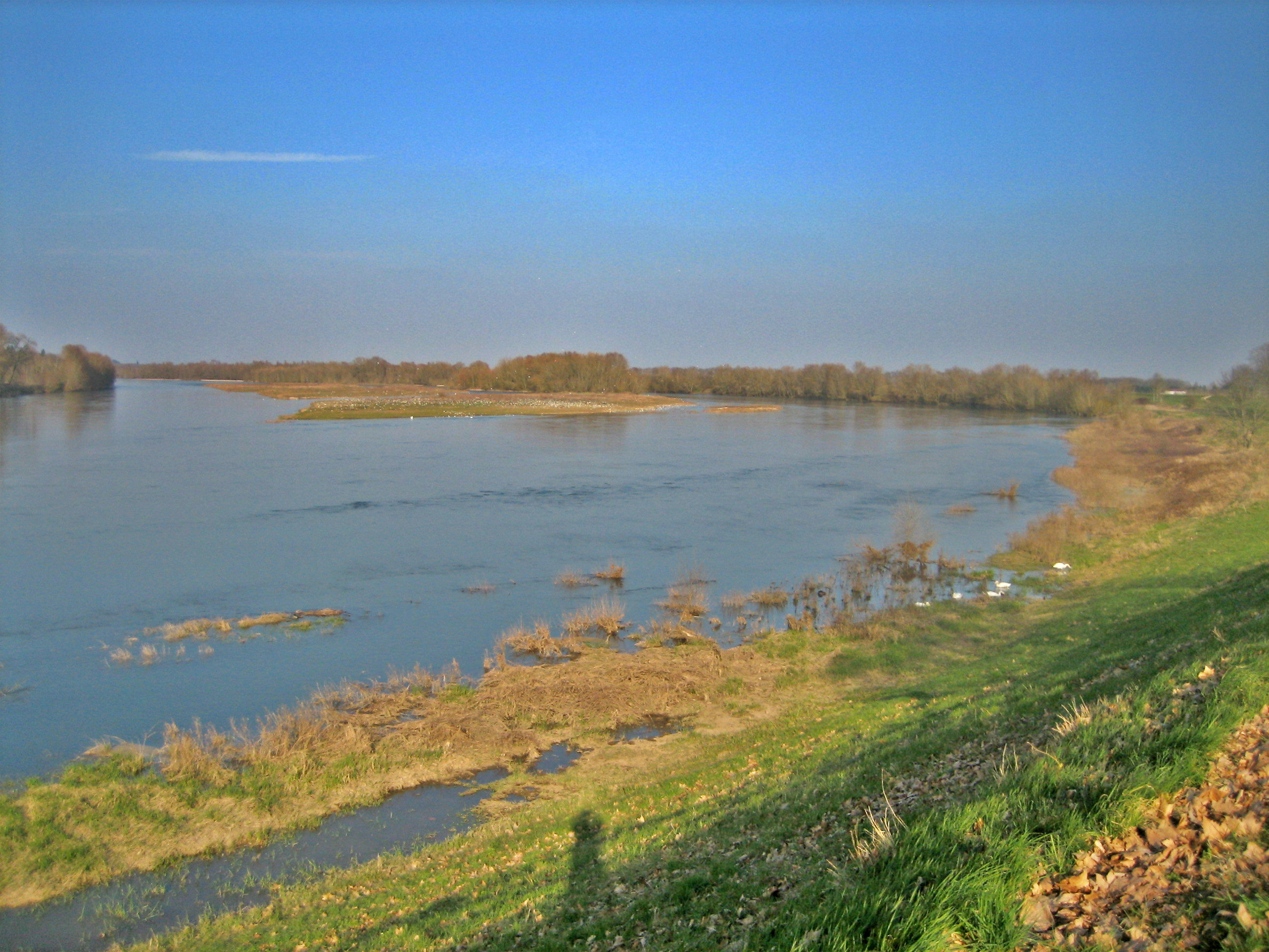 L’Île aux Oiseaux depuis la rive gauche de la Loire, Sandillon, Loiret, Centre, France